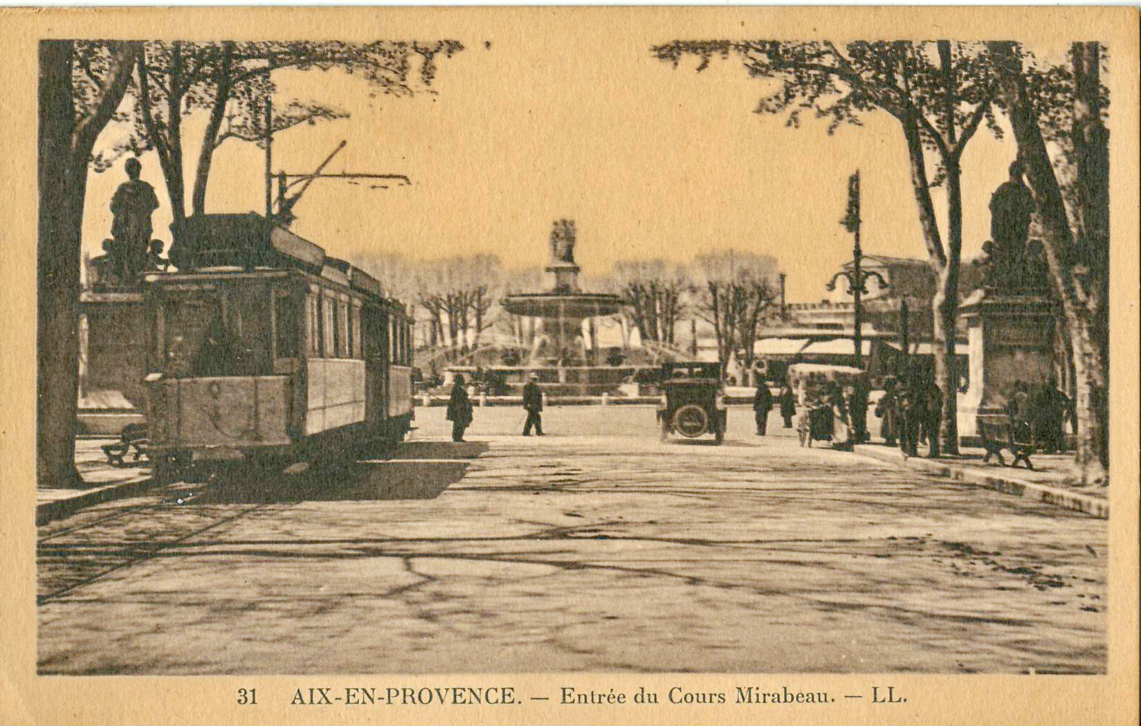 Carte postale ancienne éditée par LL, n°31 : AIX-EN-PROVENCE - Entrée du Cours Mirabeau